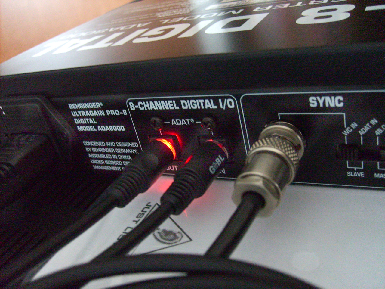 Collegamento ADAT ottico con 8 canali in ingresso e altrettanti in uscita e sincronizzazione coassiale